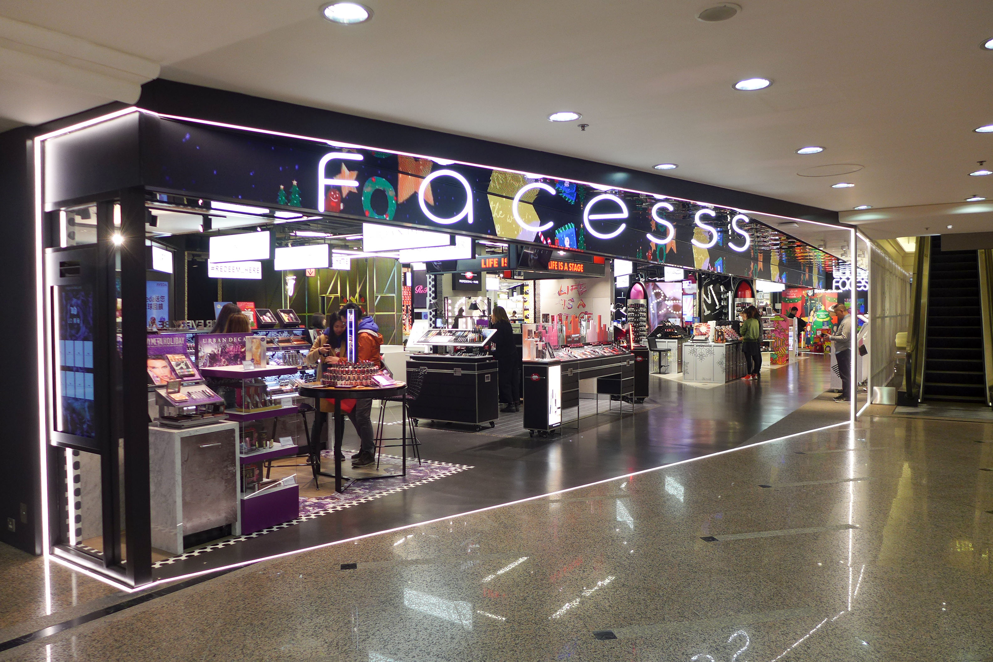 Times Square Level 4 Facesss